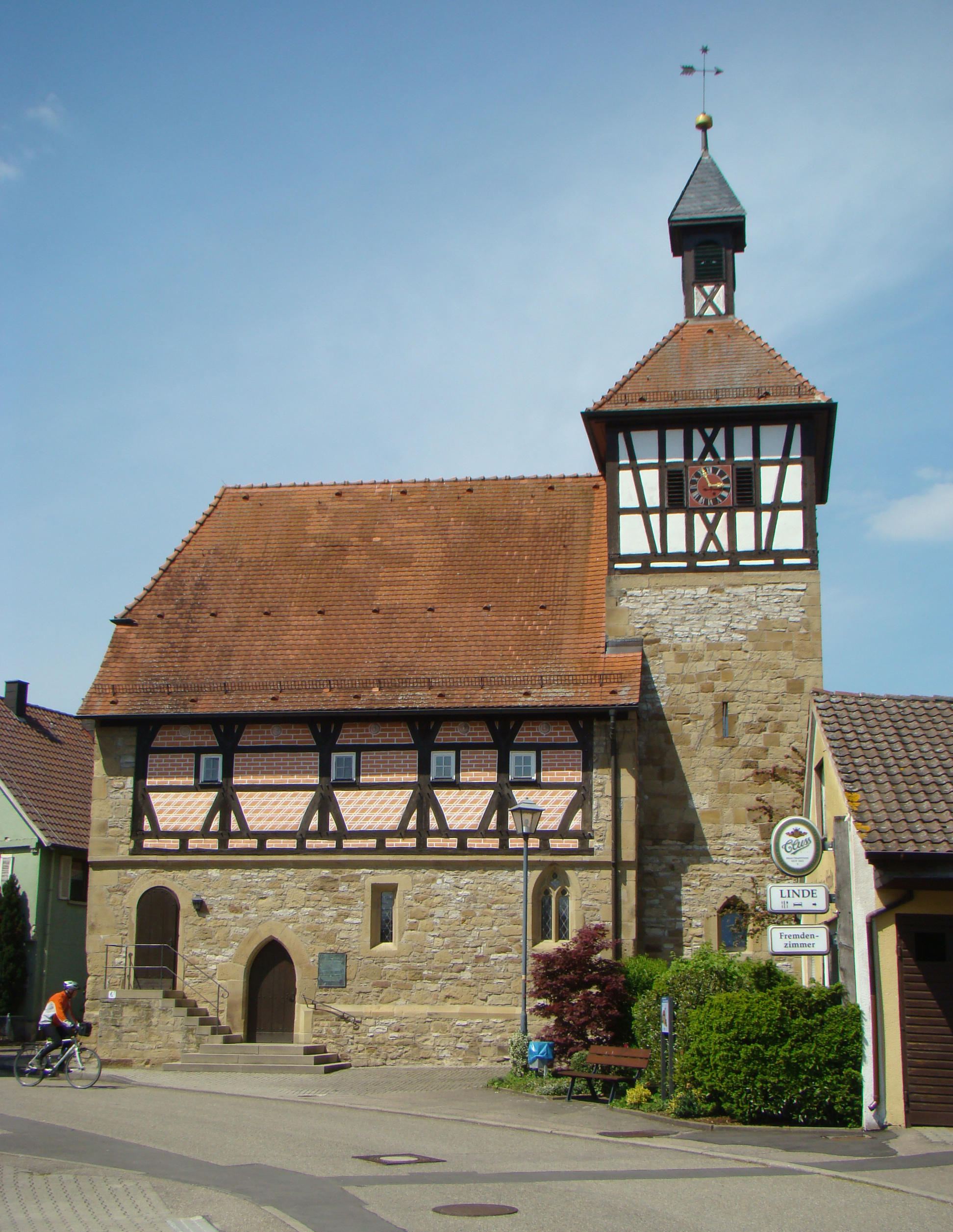 Untere Kirche in Langenbrettach-Langenbeutingen